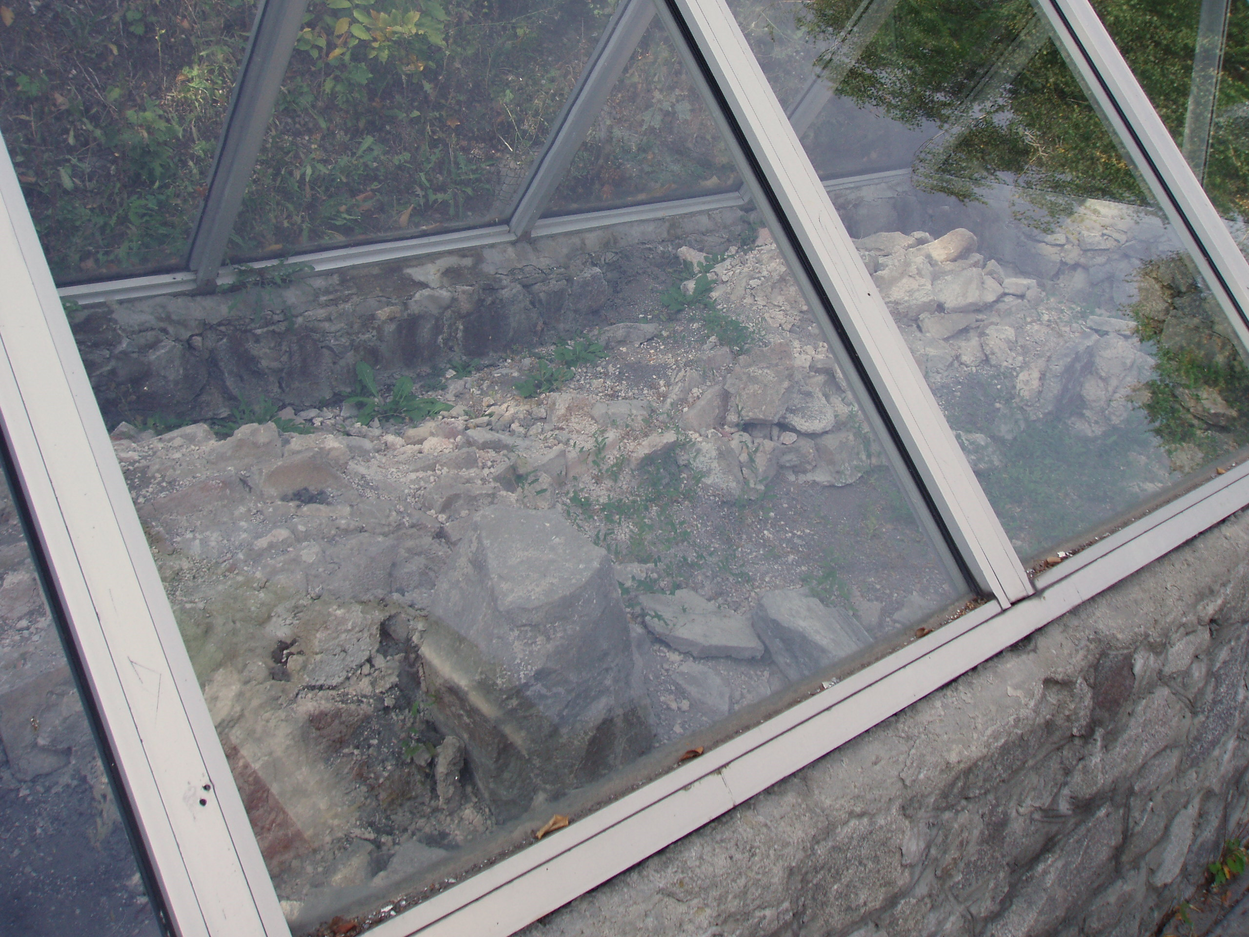 Церковь Бориса и Глеба в вышгороде Киевской области. Остатки фундамента и фрагмента стены